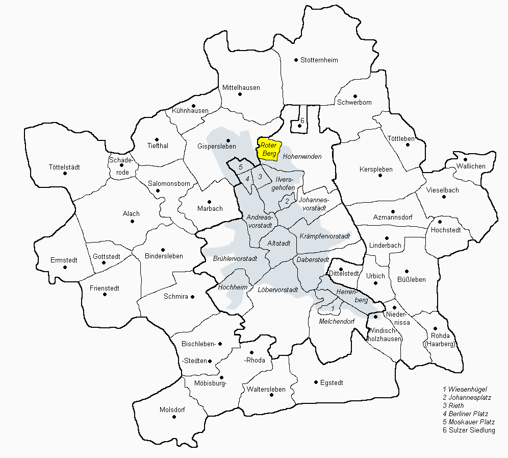 Stadtteilkarte von Erfurt, Roter Berg hervorgehoben